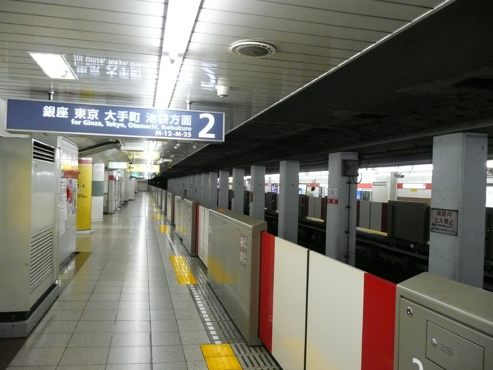 四谷三丁目駅2番ホーム